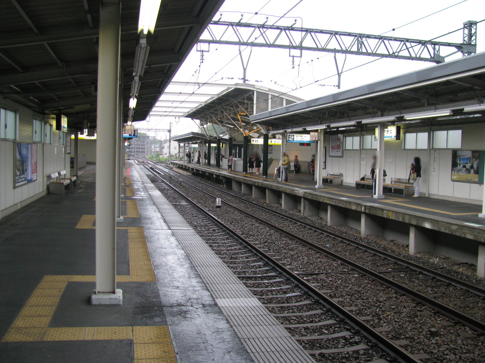 京浜急行久里浜線YRP野比駅